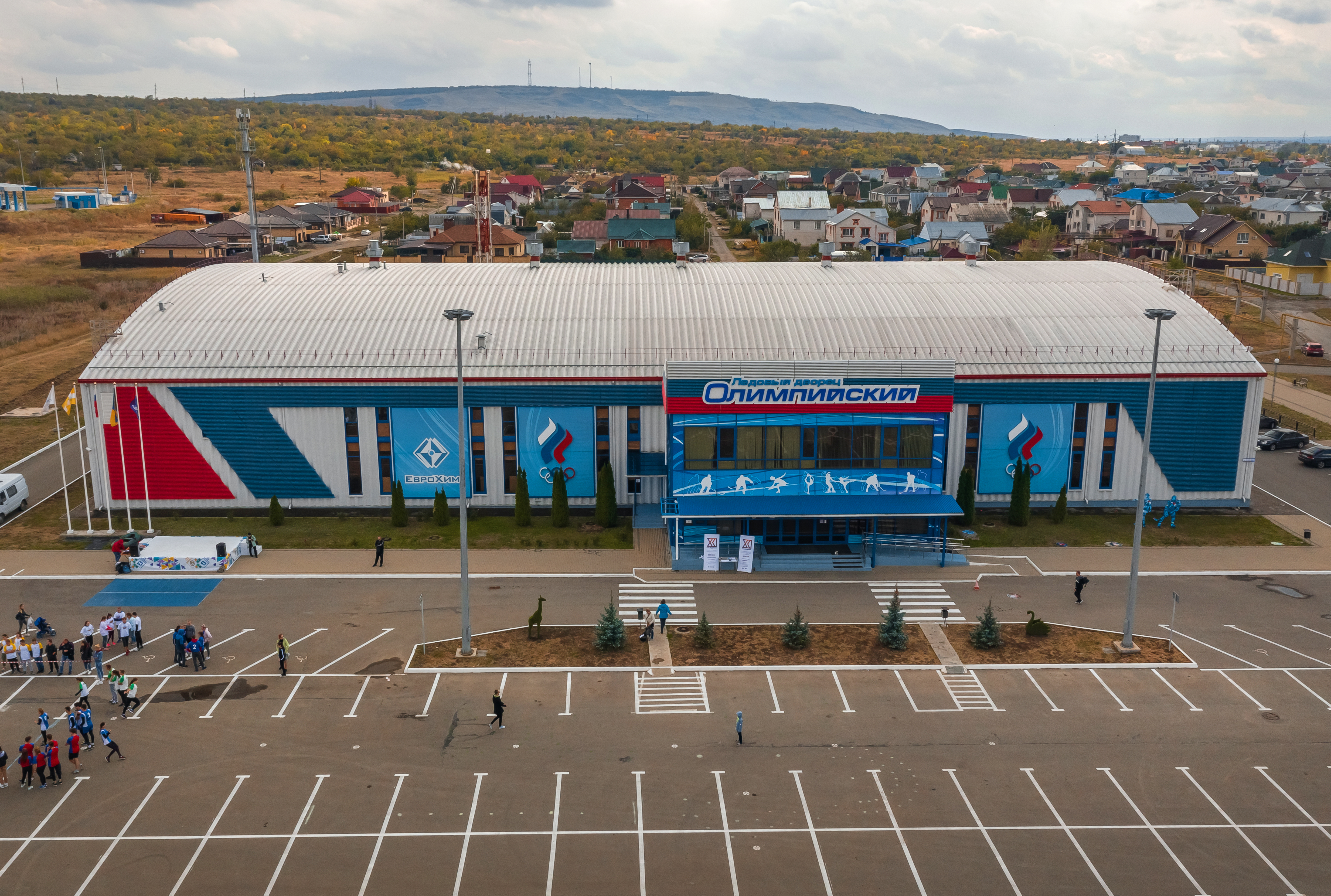 Ледовый дворец "Олимпийский" в г. Невинномысске